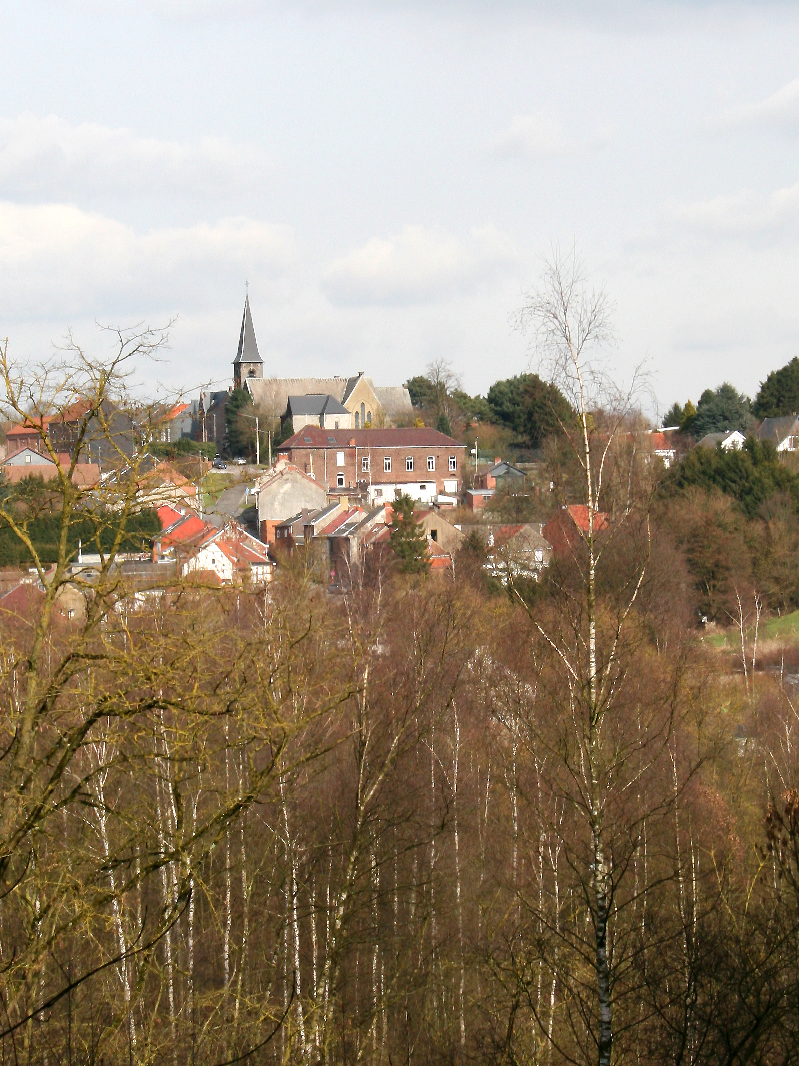 Viesville (Belgique), le village.